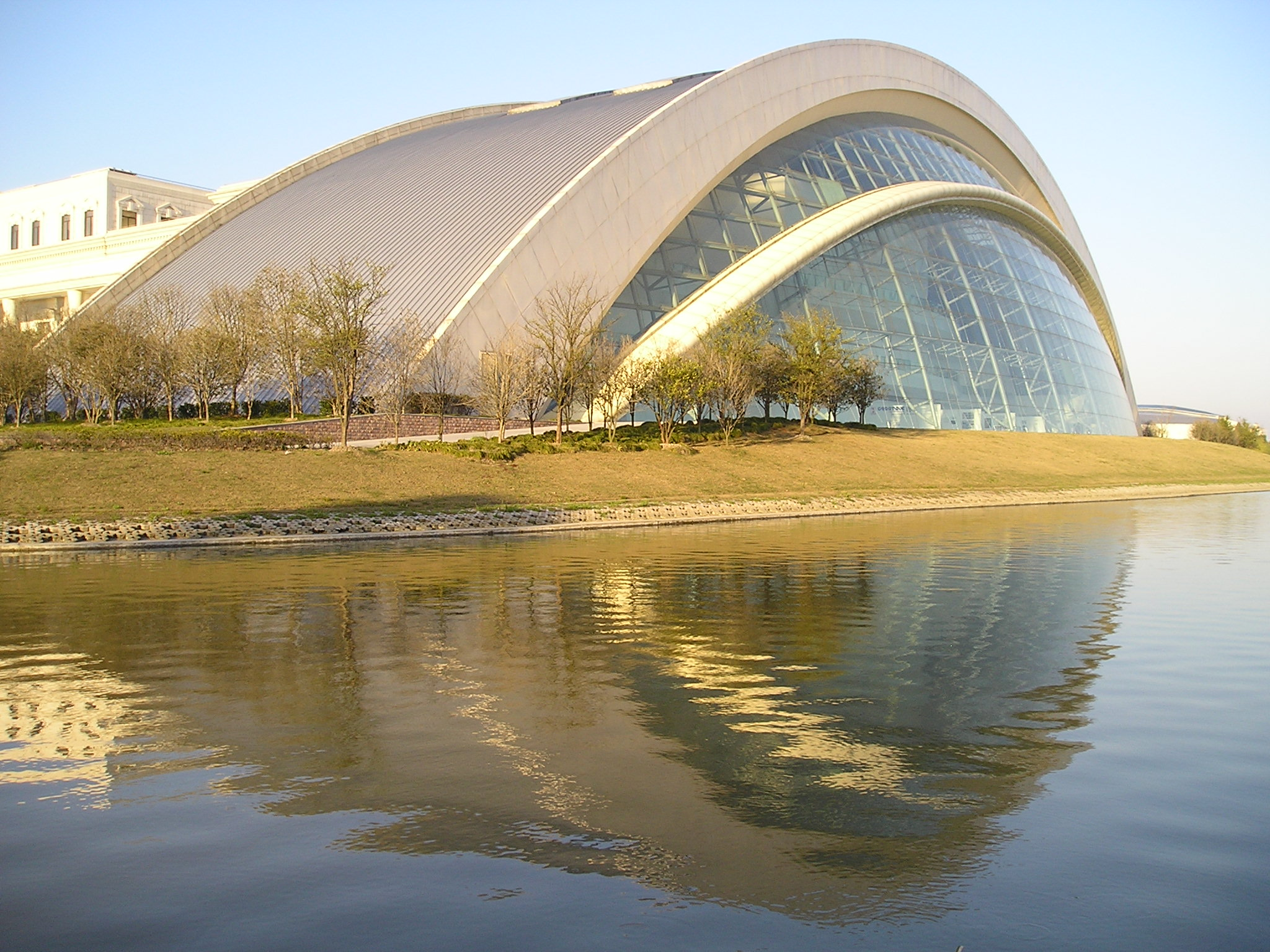 复旦大学上海视觉艺术学院图文信息中心外景--标志性建筑“大眼睛”。